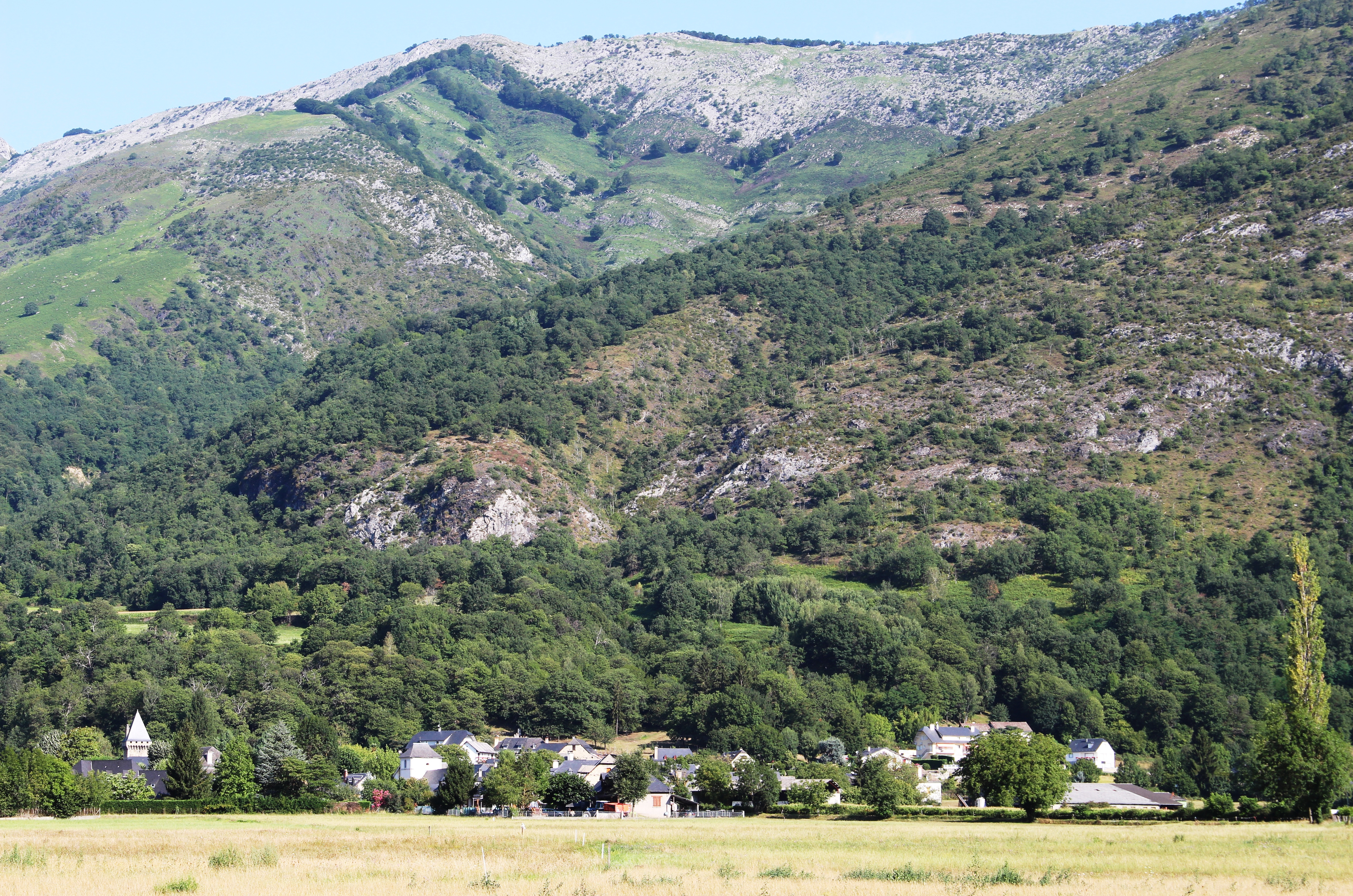 Ayzac-Ost (Hautes-Pyrénées)